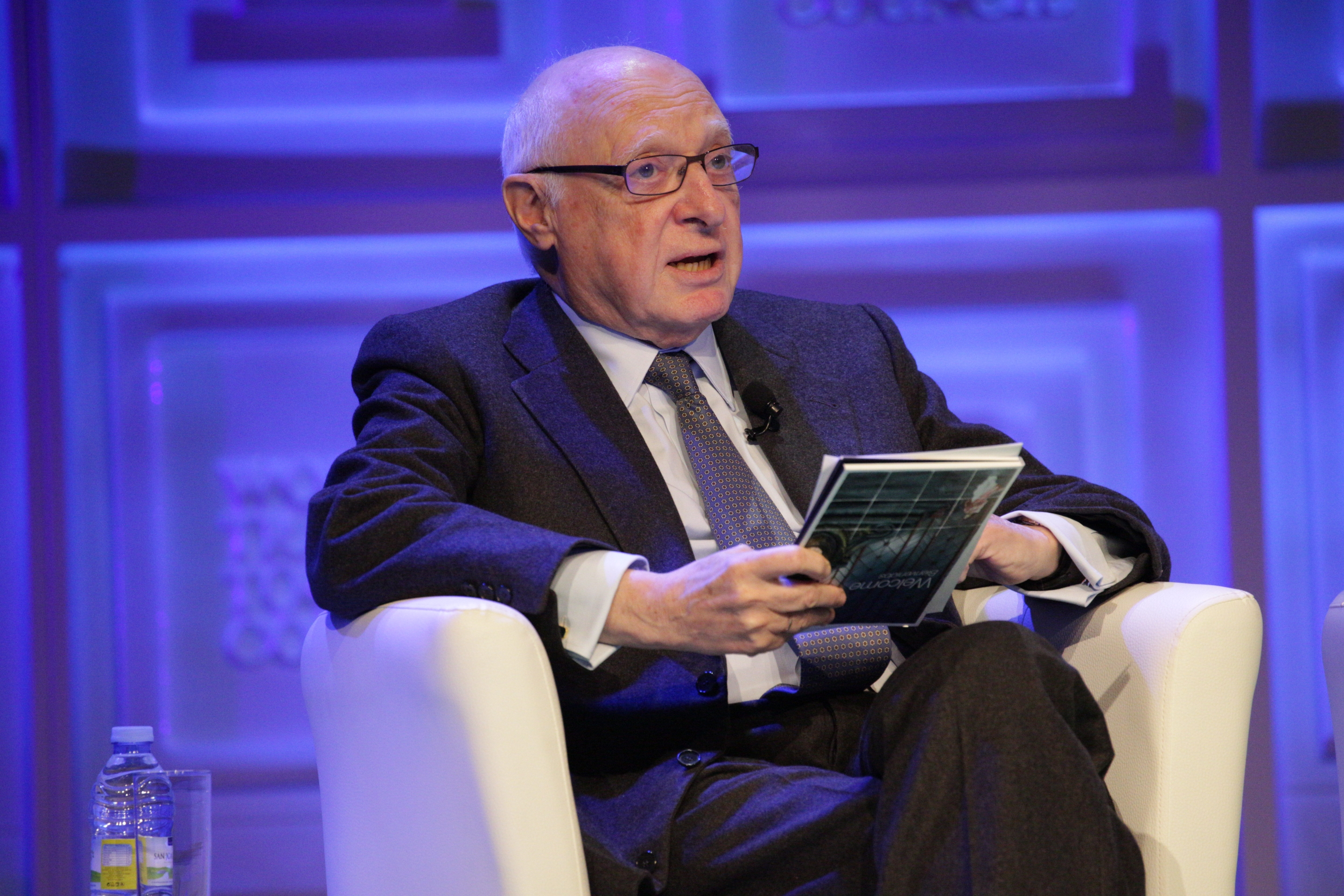 WTTC Global Summit 2015